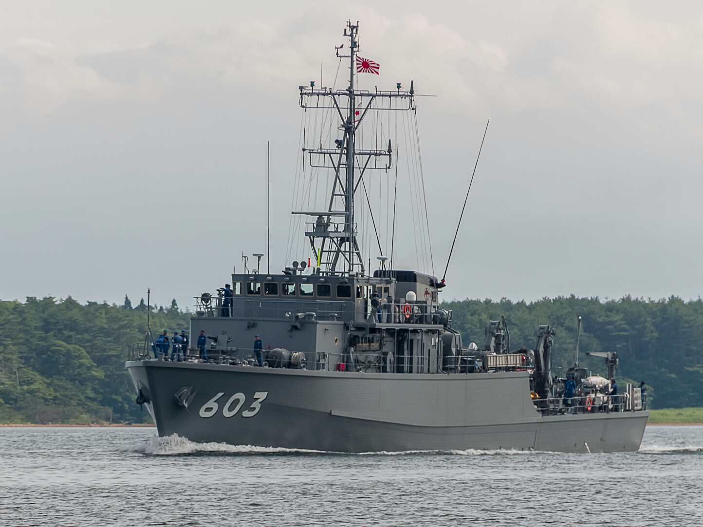 大湊基地を出港する｢たかしま｣